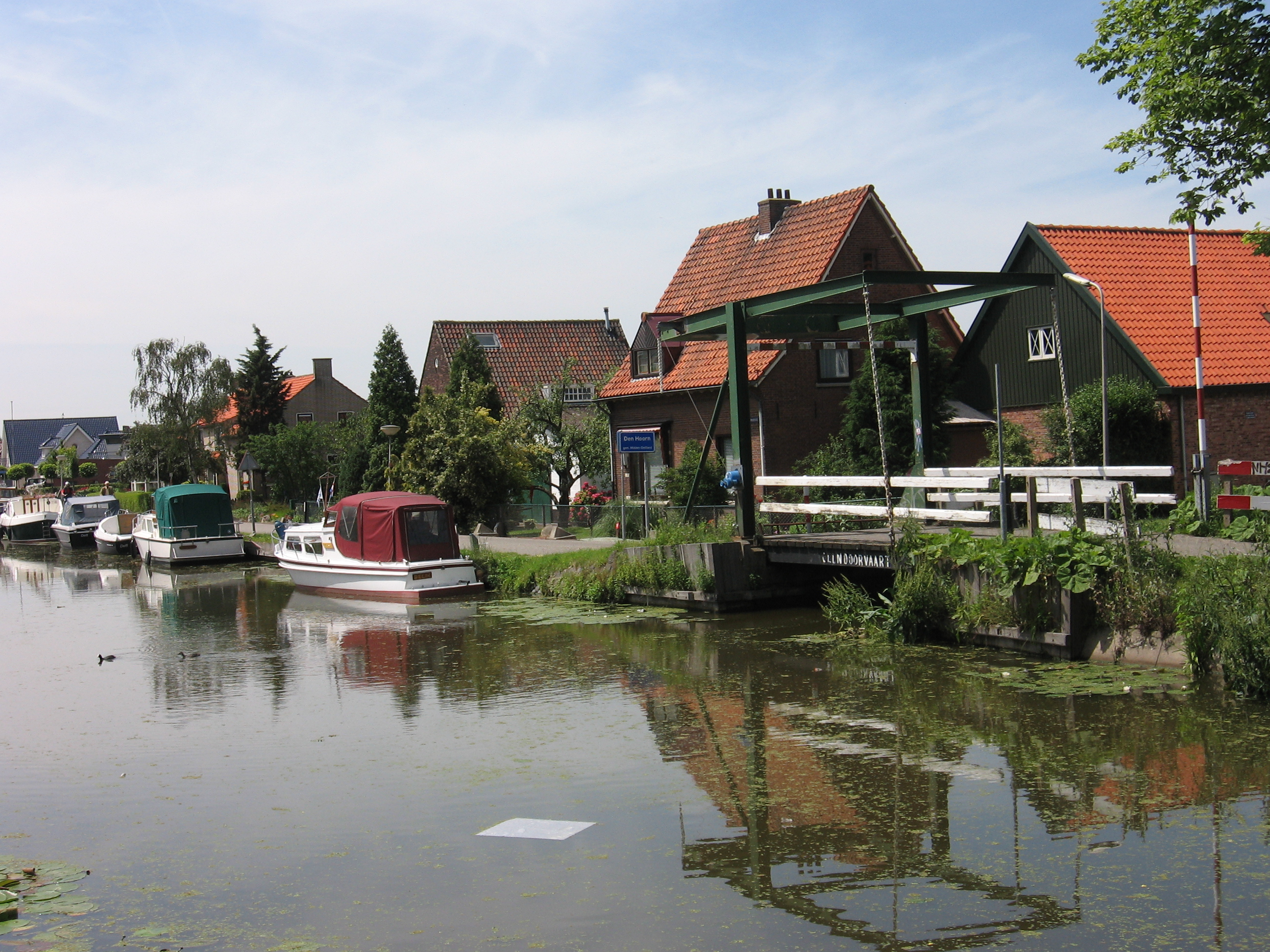 Den Hoorn, Hoornsekade, Gaag